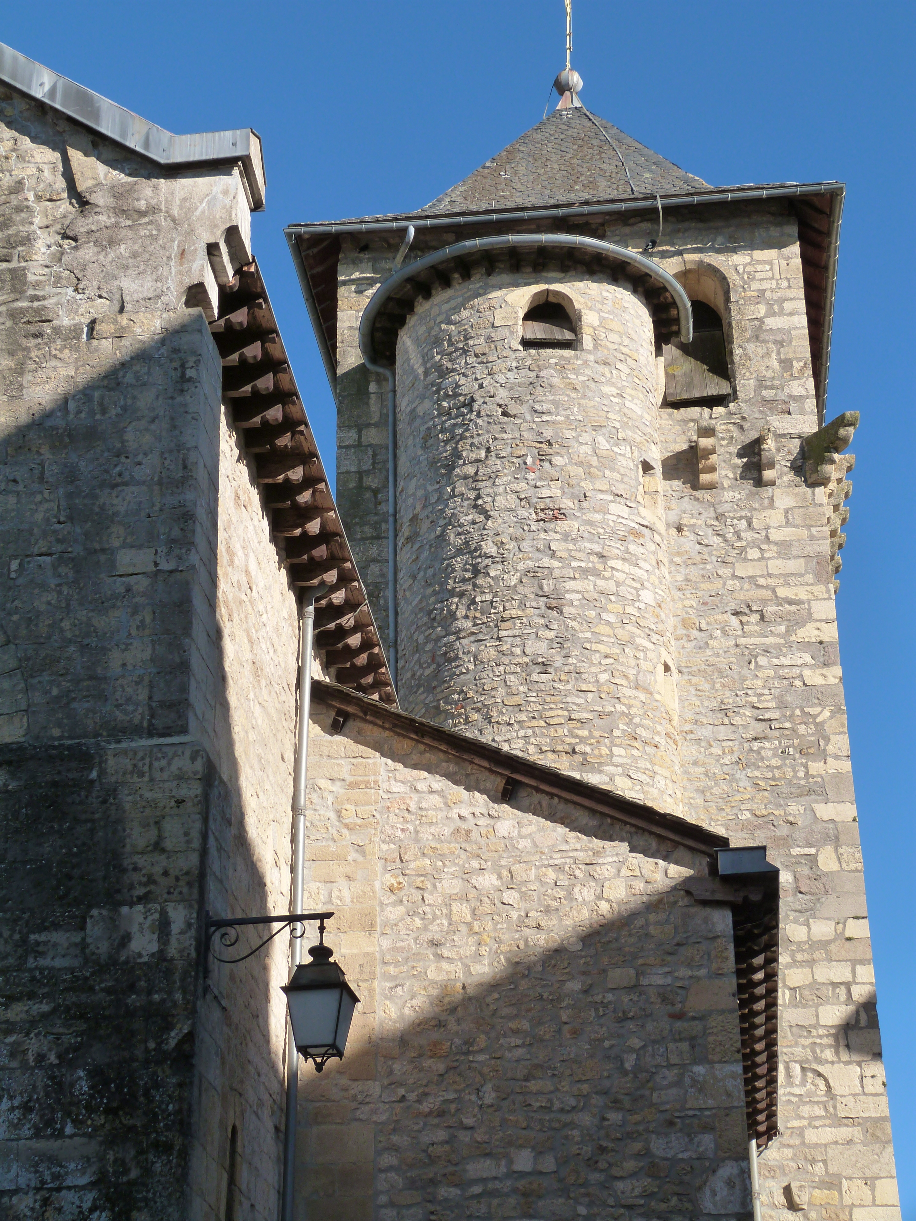 Clocher de l'église dédiée à Saint-Géraud à Montbazens